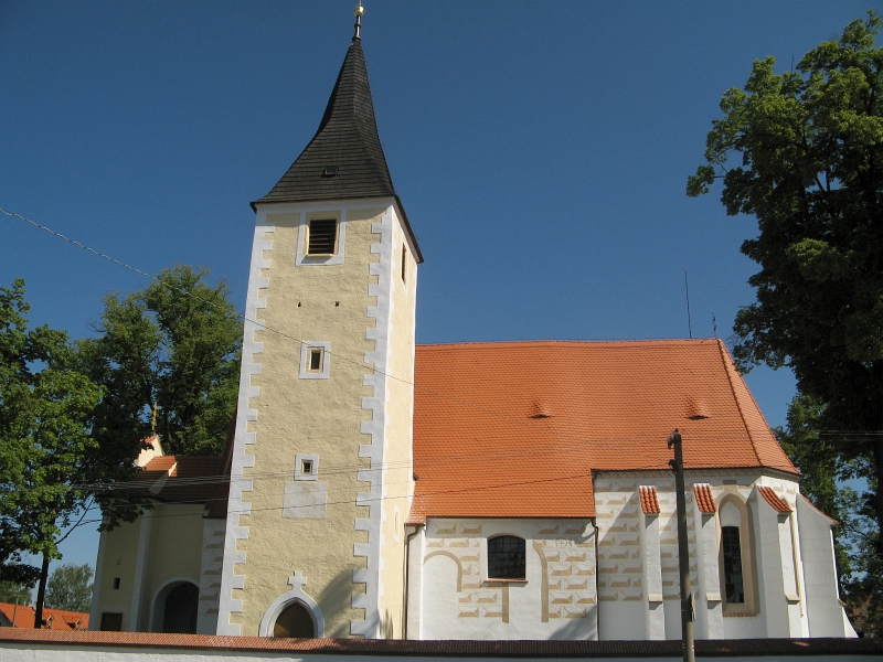 Kostel sv. Bartoloměje (Mladošovice), Mladošovice